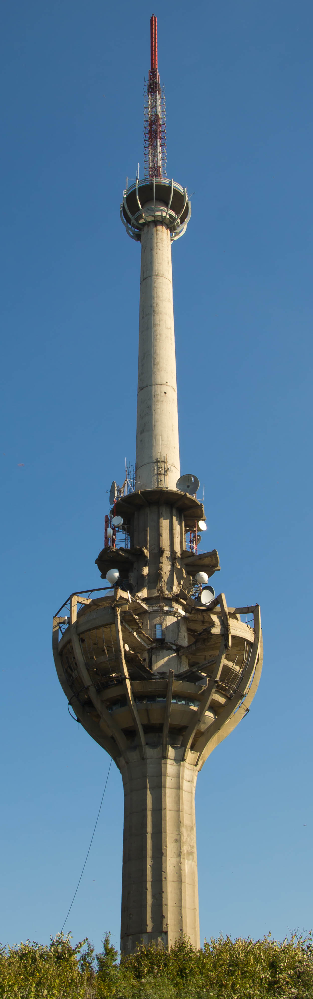 Sendemast in der Fruska Gora. Überbleibsel des Natobombardements von 1999.